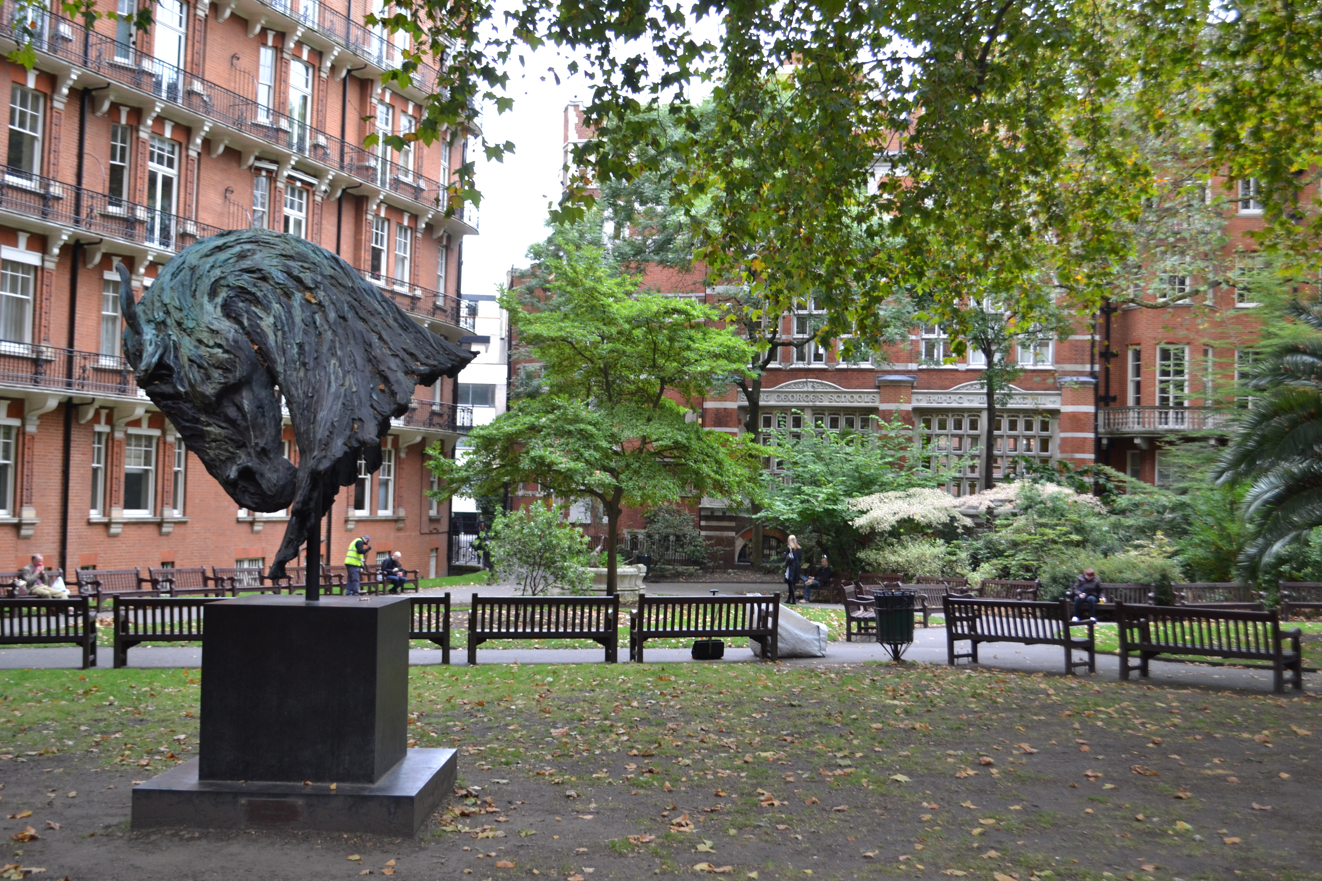 Mount Street Gardens, quartier de Mayfair, Londres.